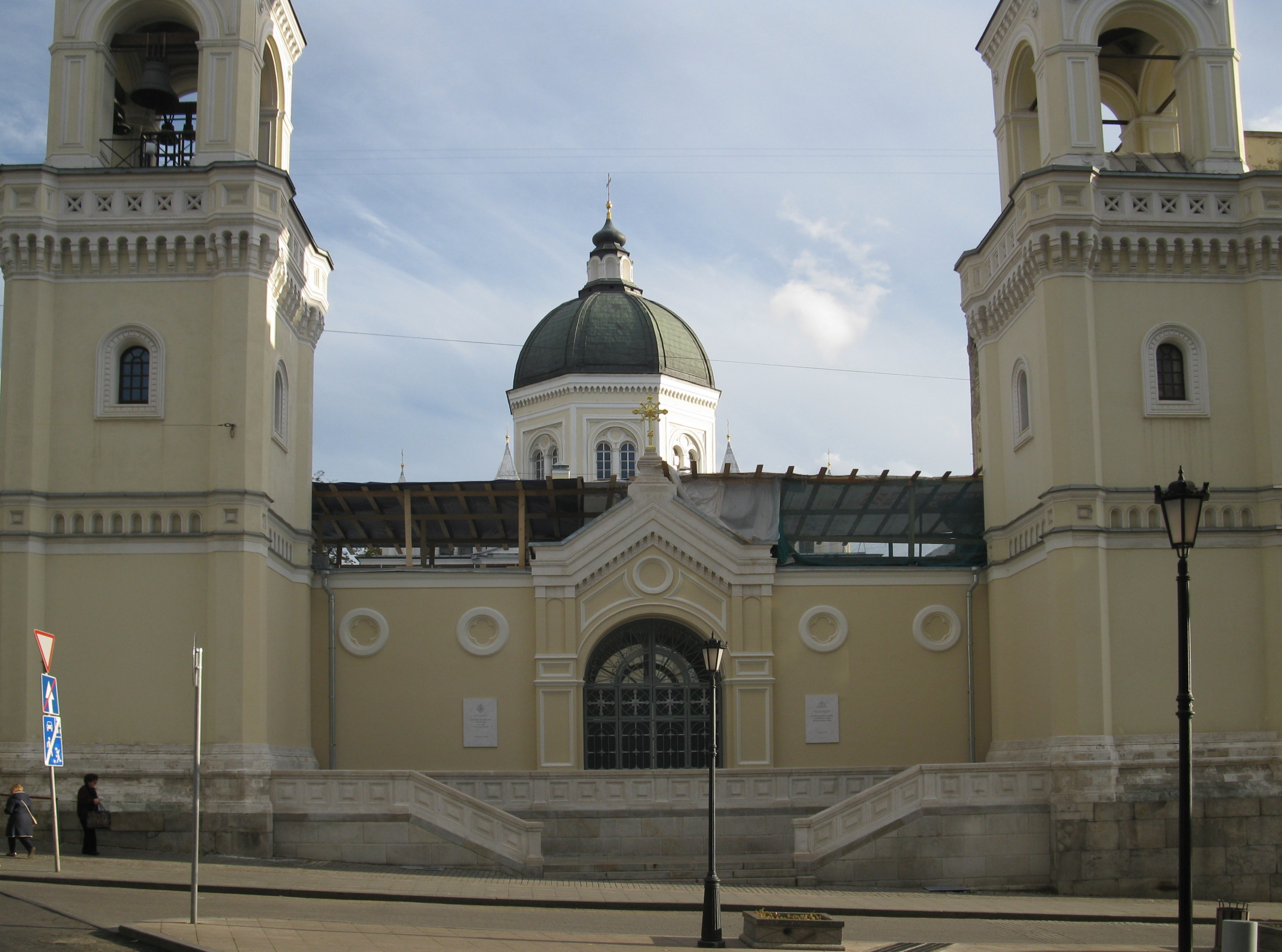 Собор Усекновения главы Иоанна Предтечи с галереями: Ивановский М. пер., дом 2, строение 33, Басманный, Центральный округ, Москва